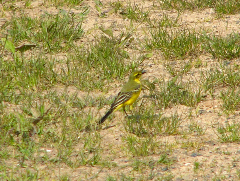 Motacilla flava flavissima (Englische Schafstelze)